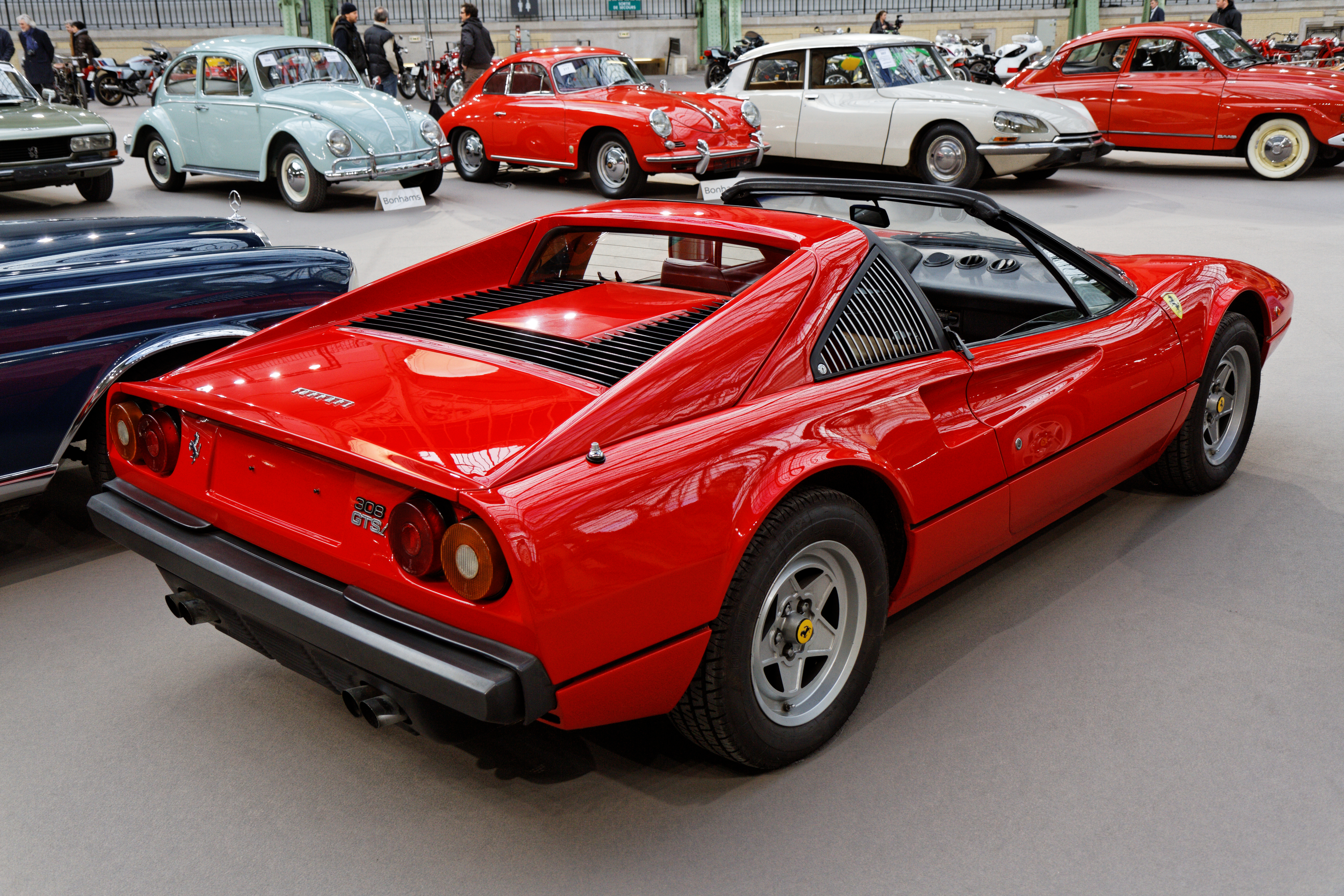 Une Ferrari 308GTSi berlinette au Grand Palais lors de la vente Bonhams en février 2014.